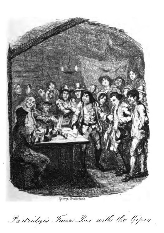 Illustration de George Cruikshank pour une édition de Tom Jones chez George Bell and Sons, livre XII, ch. XII : Partrige a été surpris, par le mari, en conversation galante avec une jeune bohémienne.